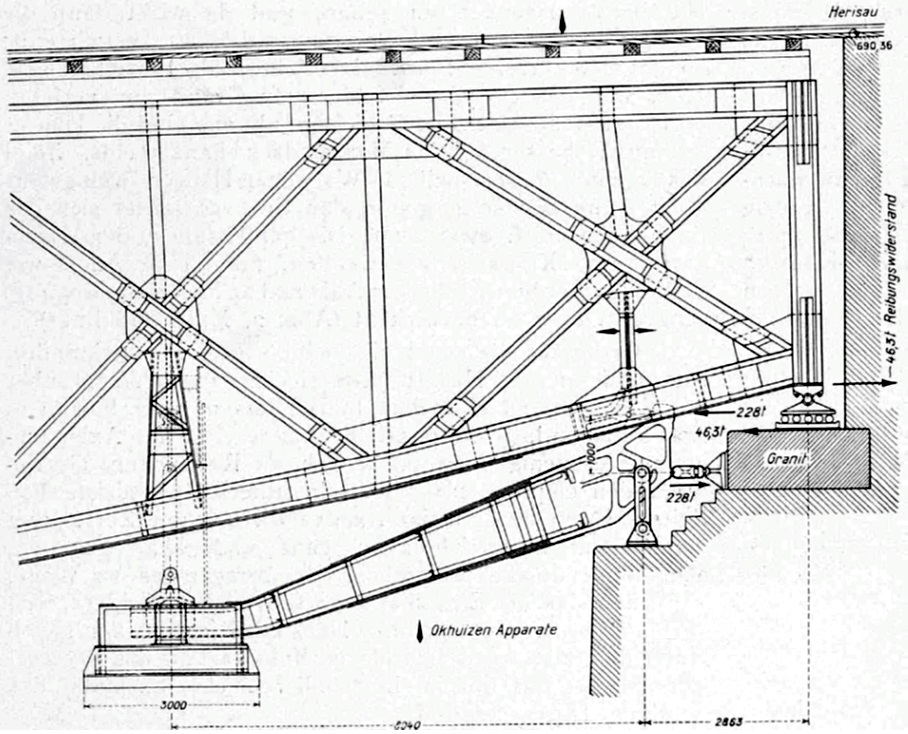 Sitterviadukt der Bodensee-Toggenburg-Bahn: Verspannvorrichtung auf Pfeiler V (Seite Herisau)